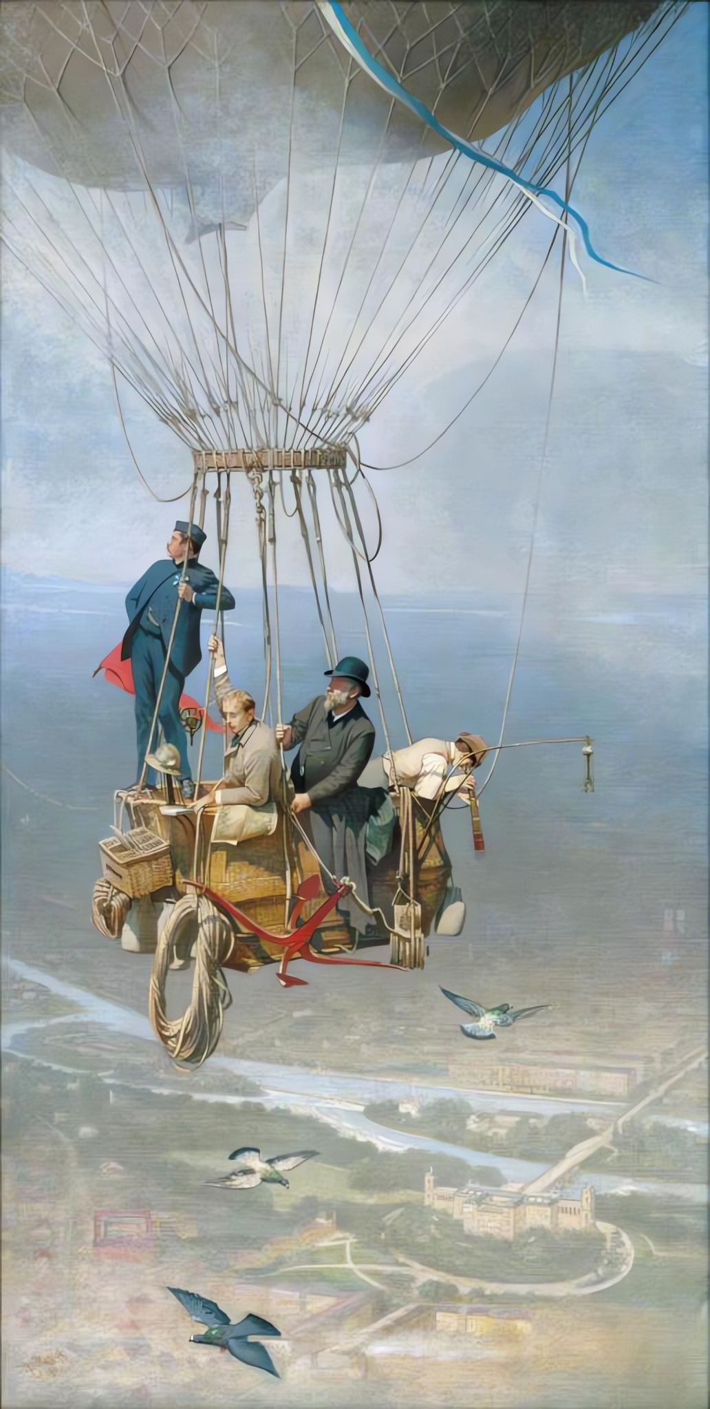 „Tausend Meter über München“, 1890. Ganz links ist Karl von Brug abgebildet, der Begründer der Luftfahrt in Bayern; zum Zeitpunkt der Darstellung war Brug Leiter der 1887 aufgestellten bayerischen Kraftfahrer- und Luftschiffer-Abteilung im Ingenieurkorps der Königlich Bayerischen Armee.